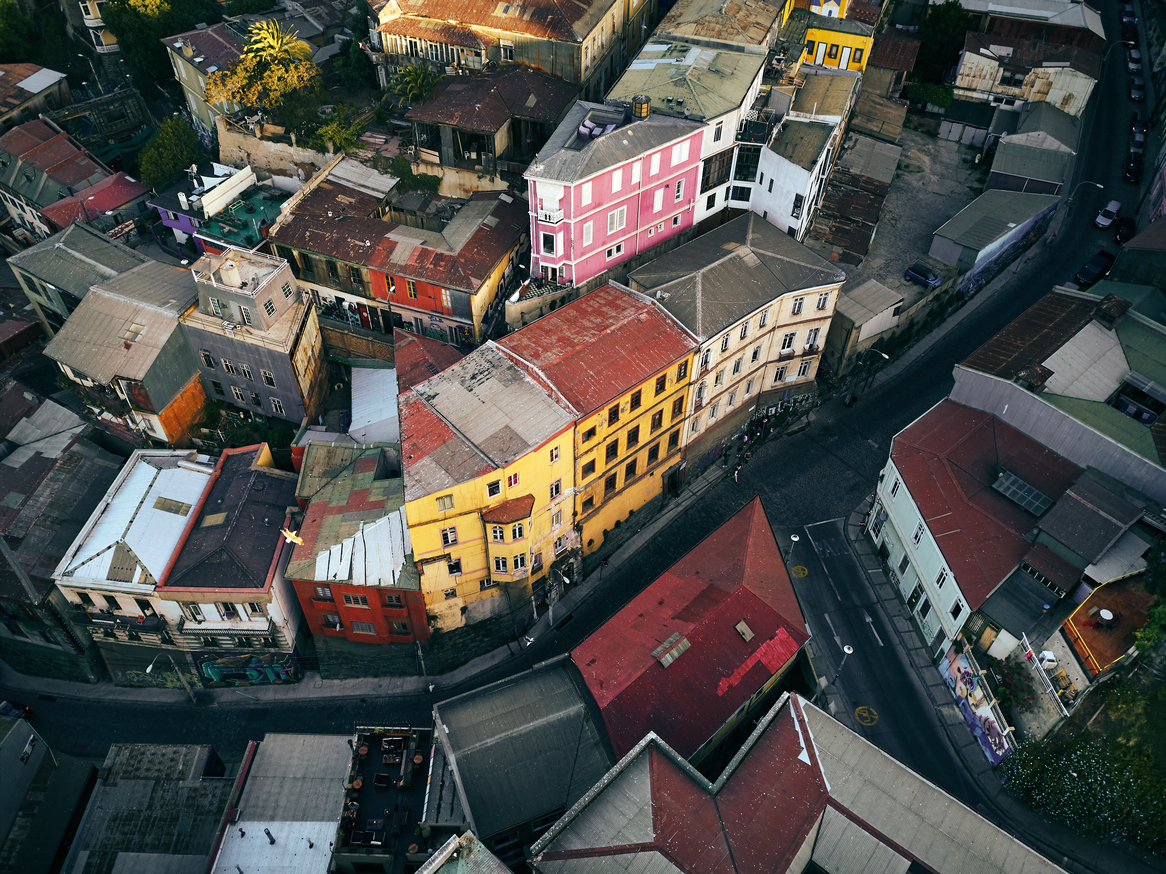 Cerro Concepción, Valparaíso